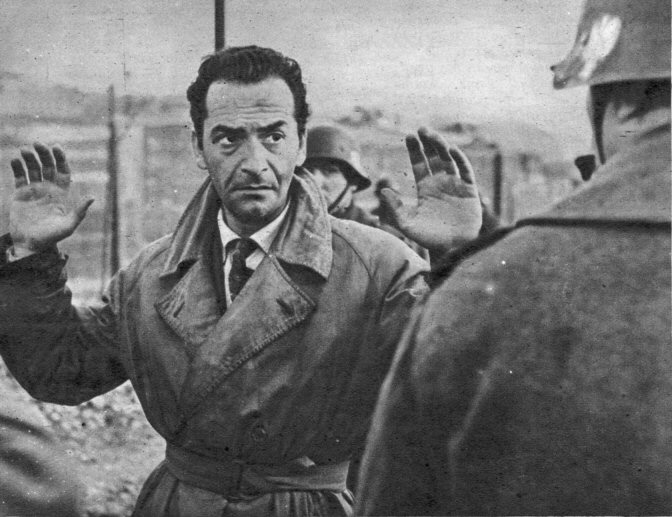 Foto di scena di Achtung! Banditi!, regia di Carlo Lizzani (1951). Dalla rivista Cinema Nuova serie, quindicinale di divulgazione cinematografica, V, 80, 15 febbraio 1952, pag. 68.